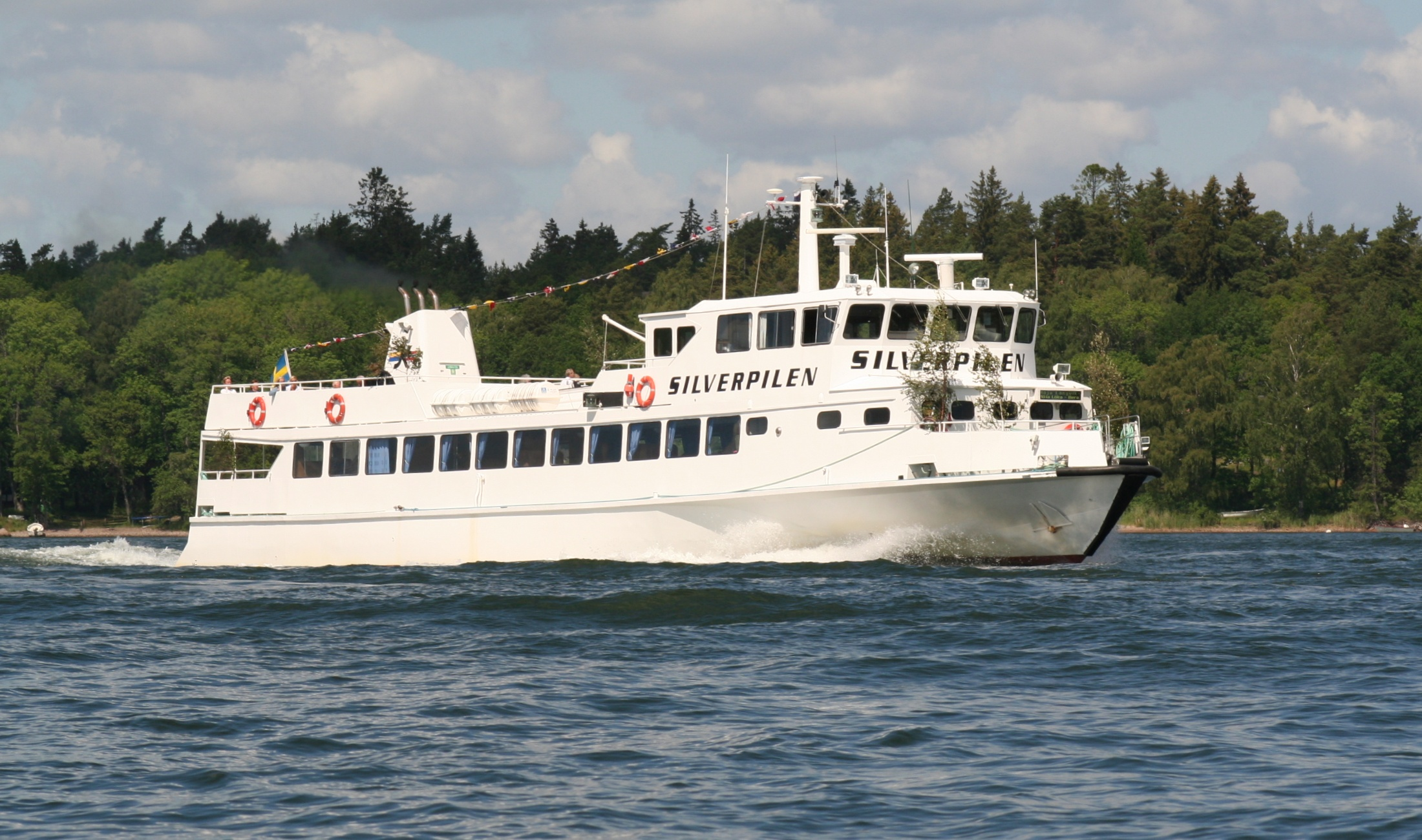 Silverpilen på väg österut från Lindalssundet vid midsommar 2006. IMO number: 9621393 Källa: eget foto, fotograf EnDumEn